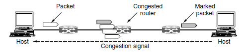 Şəkil 5. Açıq izafi yüklənmə xəbərdarlığı